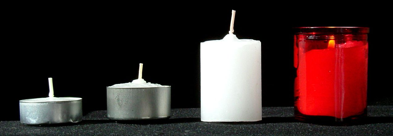 Verschiedene Varianten von Teelichten von klein (rechts, 4 Std. Brenndauer) bis groß (links, 24h Brenndauer)